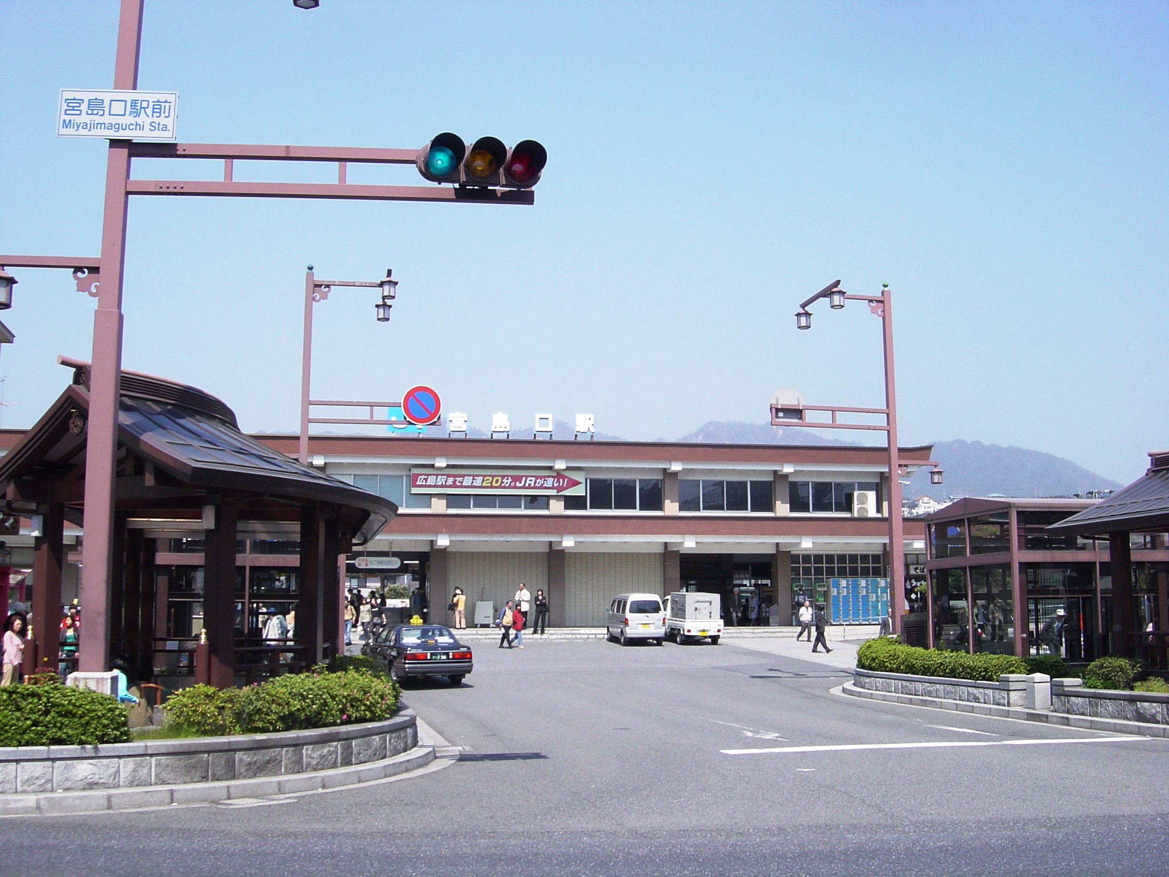 2005年4月16日、本人撮影 JR宮島口駅